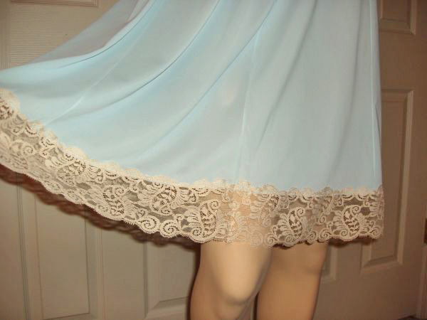 Own work, half slip